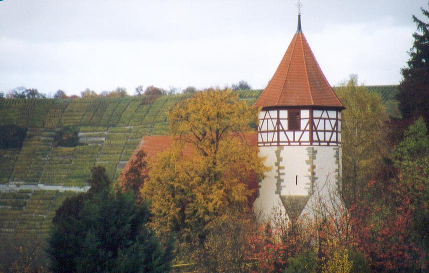 Kilianskirche in Mundelsheim, von Südosten gesehen